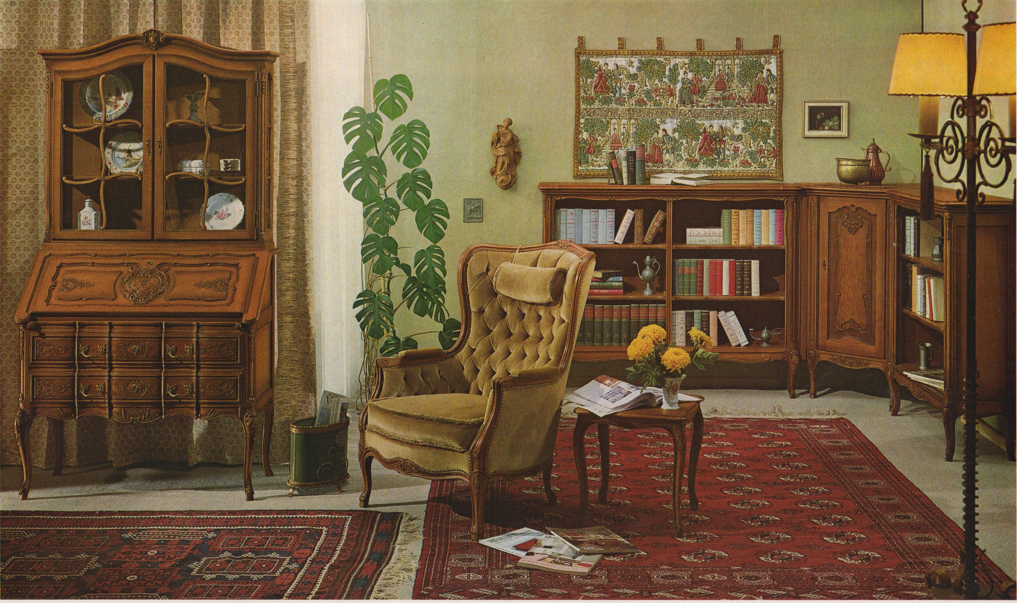 Broschüre Stilmöbelfabrik Anton Spilker, Steinheim/Westfalen, 1965, Seite 1